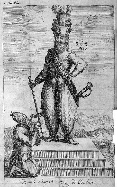 Portrait de Râjasimha II, gravure extraite de la "relation de Ceylan", Robert Knox, 1693